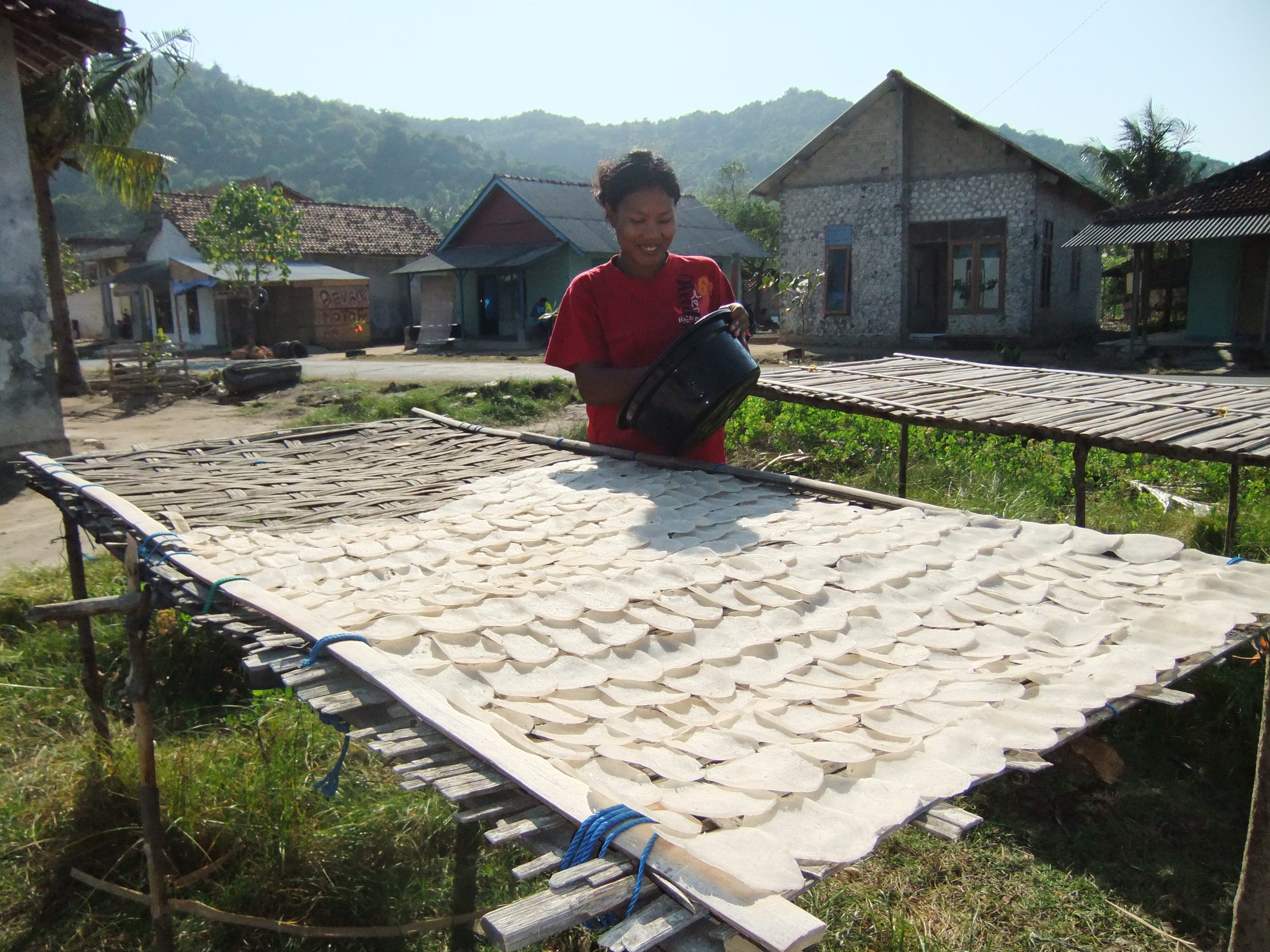 Menjemur kerupuk ikan di Karimun Jawa